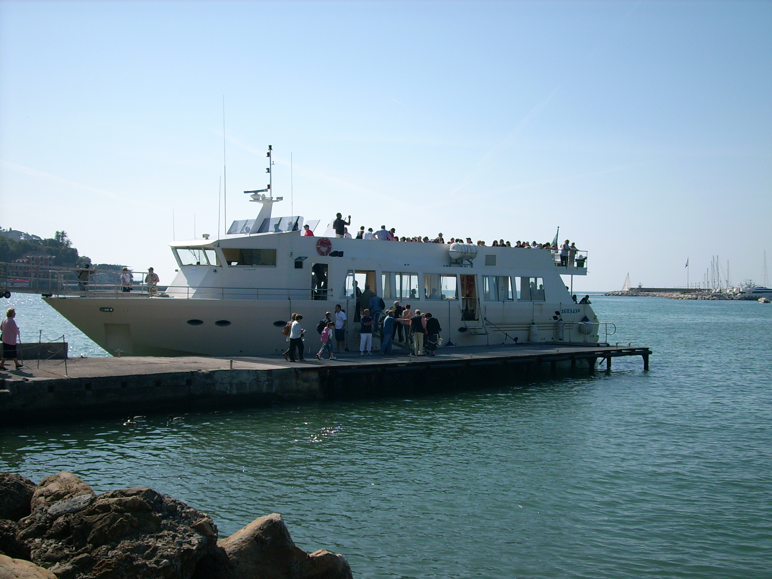 Battello nello scalo di Rapallo, Liguria, Italia